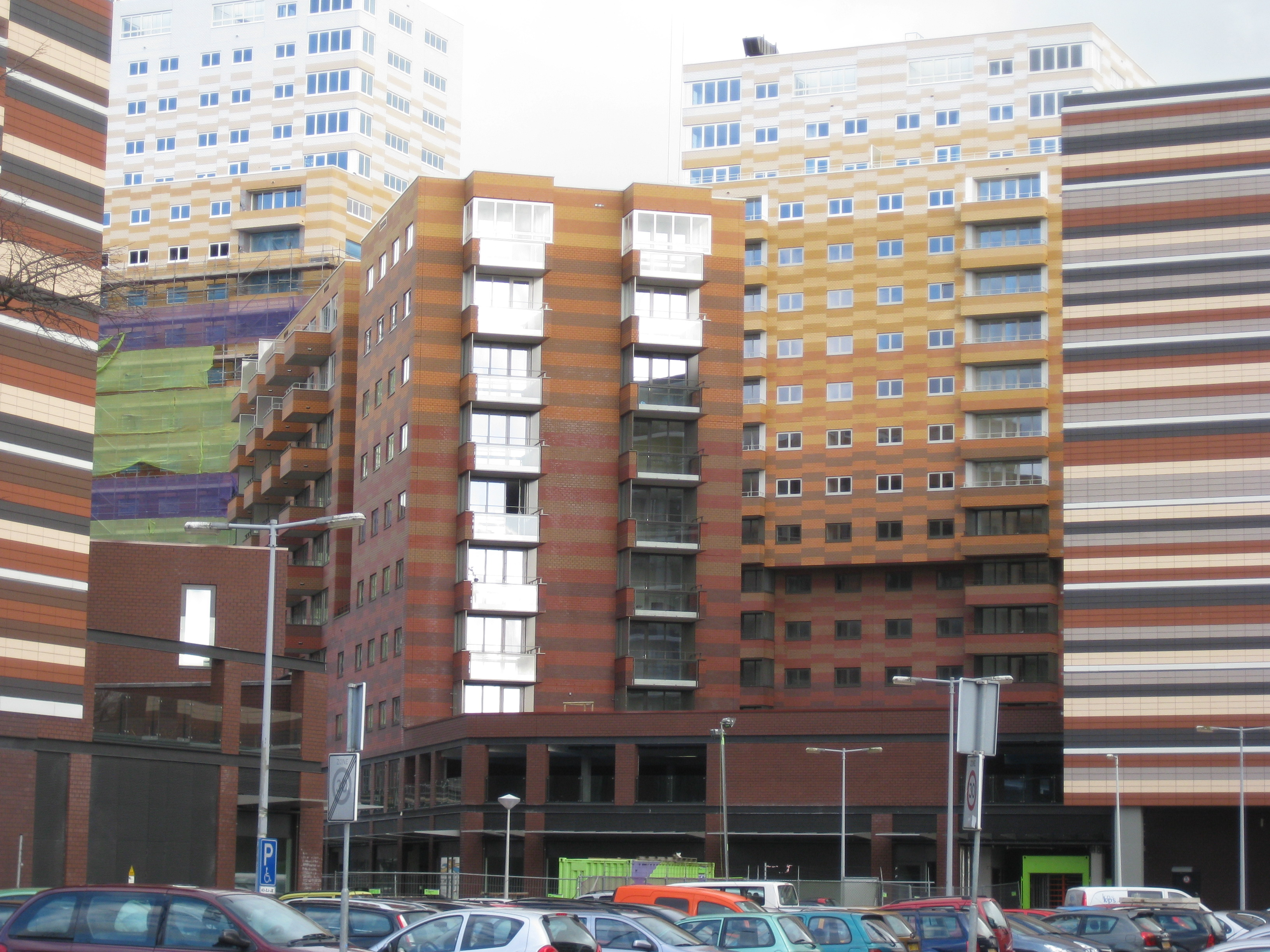 Nieuw Waterlandplein in aanbouw